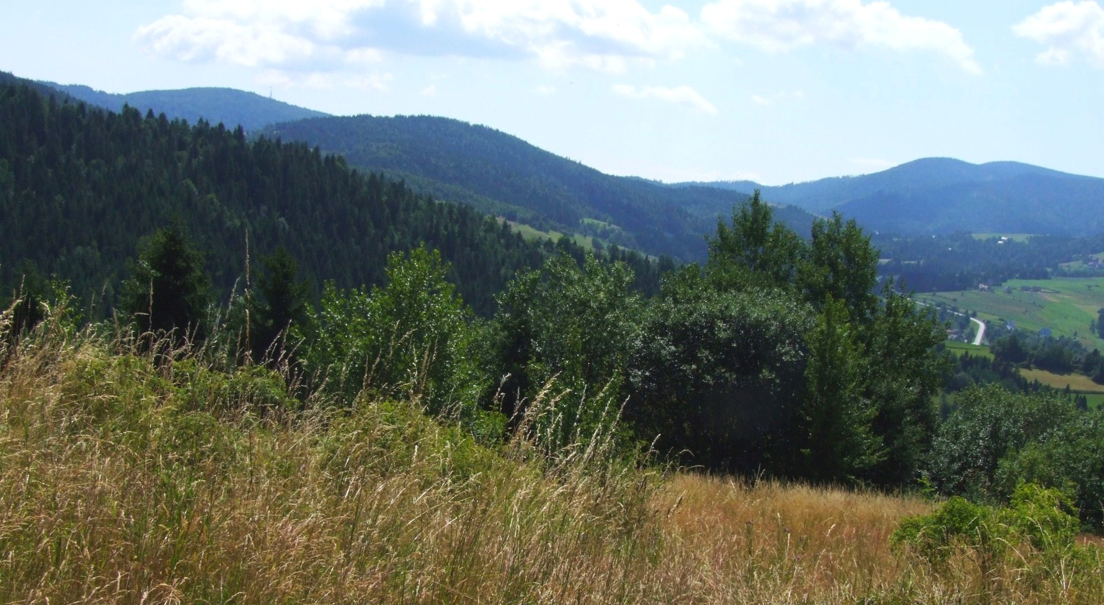 Od lewej: Kiczora Kamienicka, Myszyca,Przełęcz Przysłop, Gorc. Widok z Cyrkowej Góry